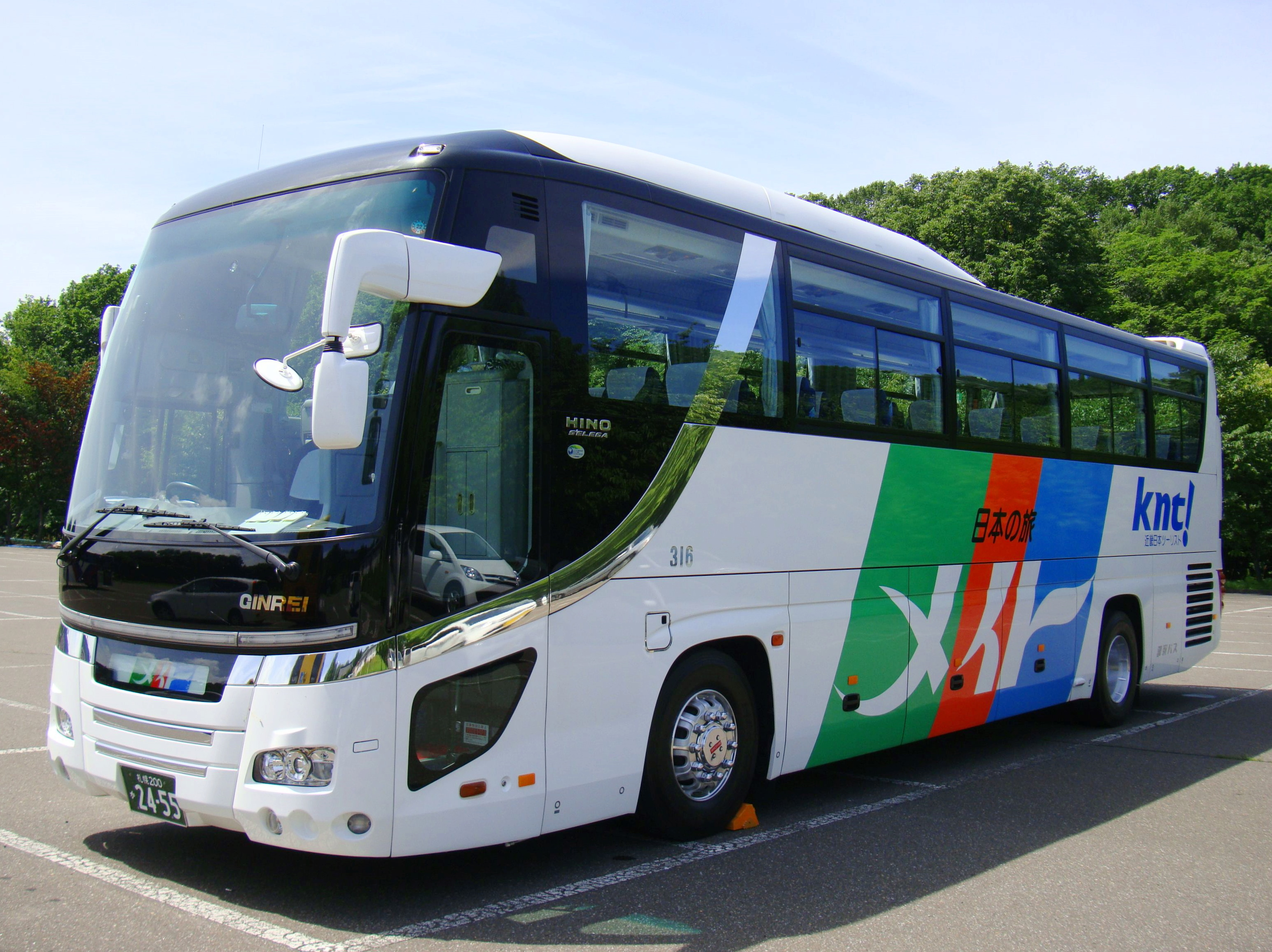 Kinki Nippon Tourist